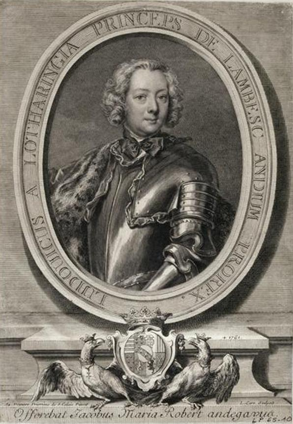 Charles-Louis de Lorraine, prince de Lambesc, comte de Brionne, Grand Ecuyer de France (1725-1761)